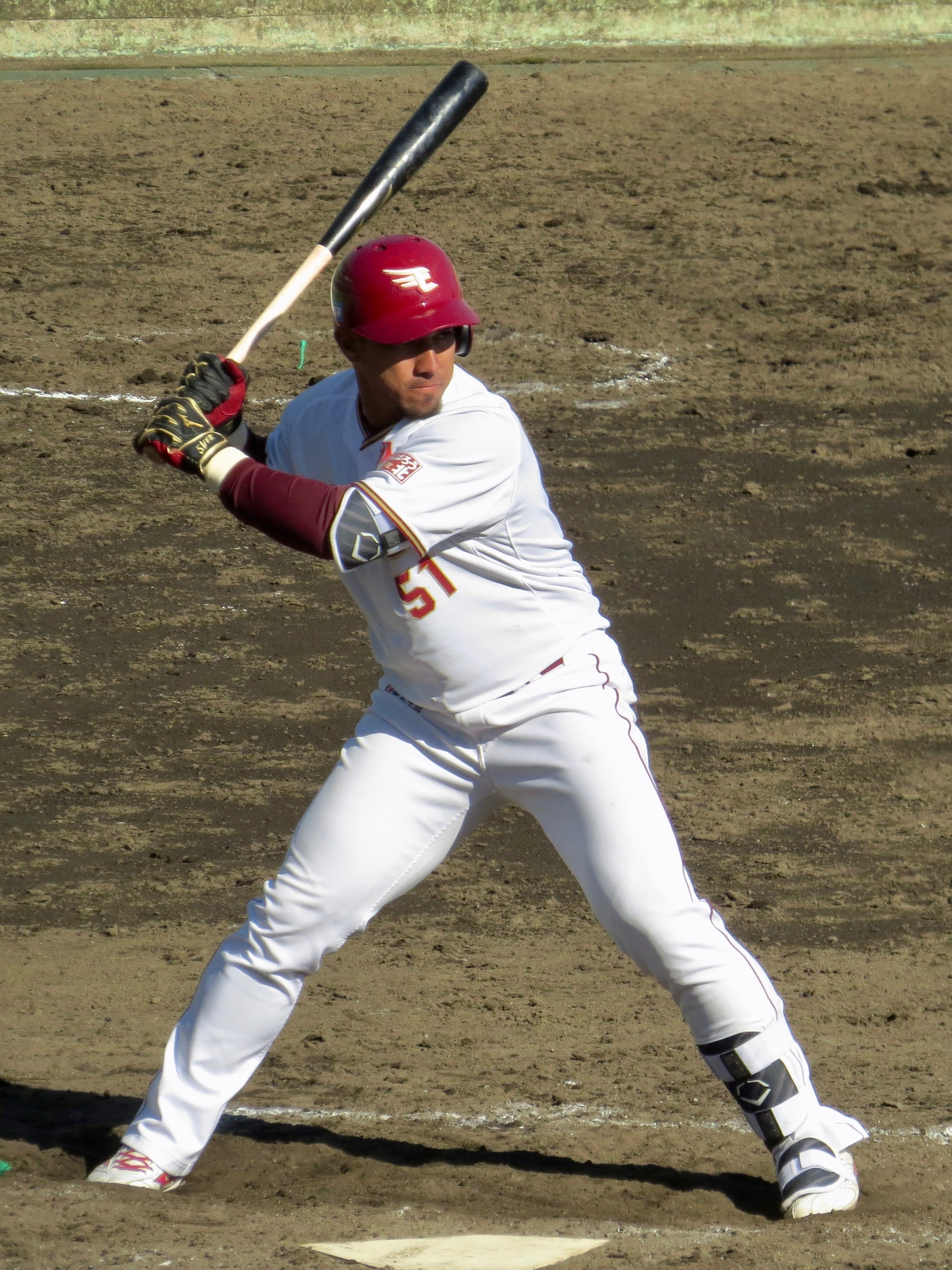 さいたま市営浦和球場にて